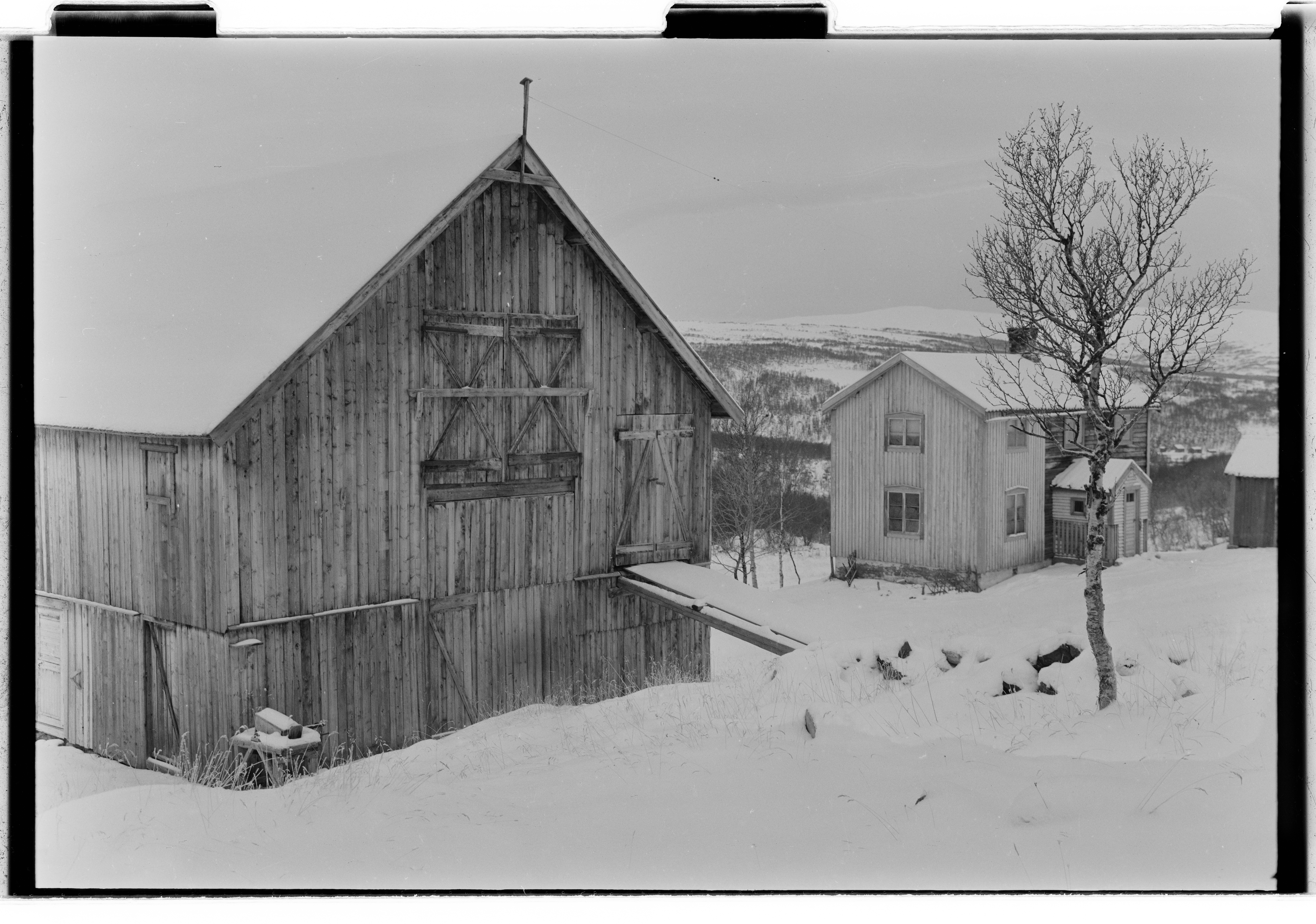 Bildet er hentet fra Arkivverket. Hessdalen, fjellgrend med forlatte gårder, vinter, mosehenting. NÅ nr. 2 Arkivinstitusjon : Riksarkivet Arkivnavn : Billedbladet NÅ Sted : Norge, Sør-Trøndelag, Holtålen, Emneord: Eksteriør, Gårder, Vinter, Fjell Avbildet